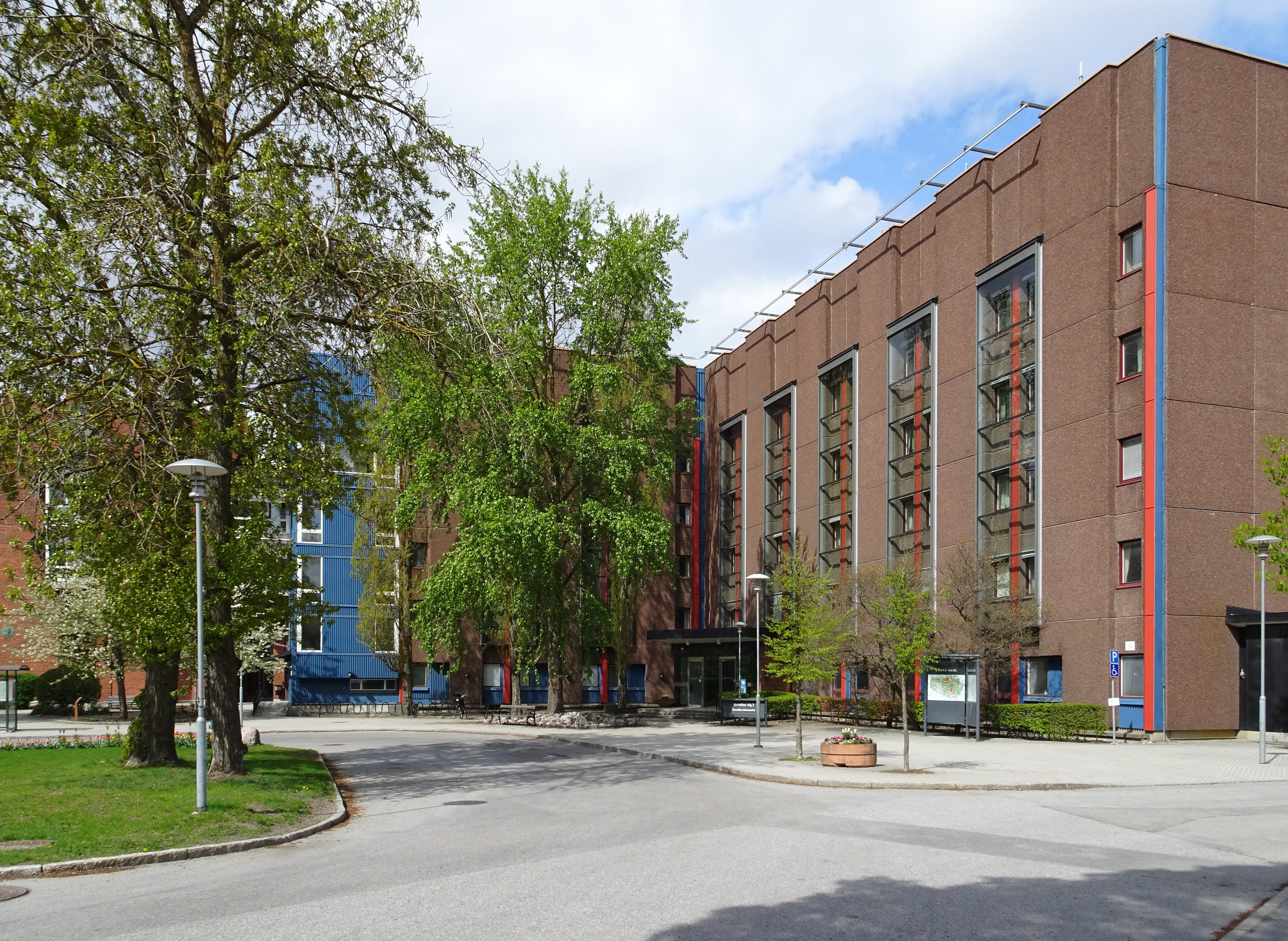 Berzeliuslaboratoriet och bibliotek, Huvudentré Berzelius väg 3, byggår 1972, arkitekt O.Hidemark, G.Månsson, L.Olsson